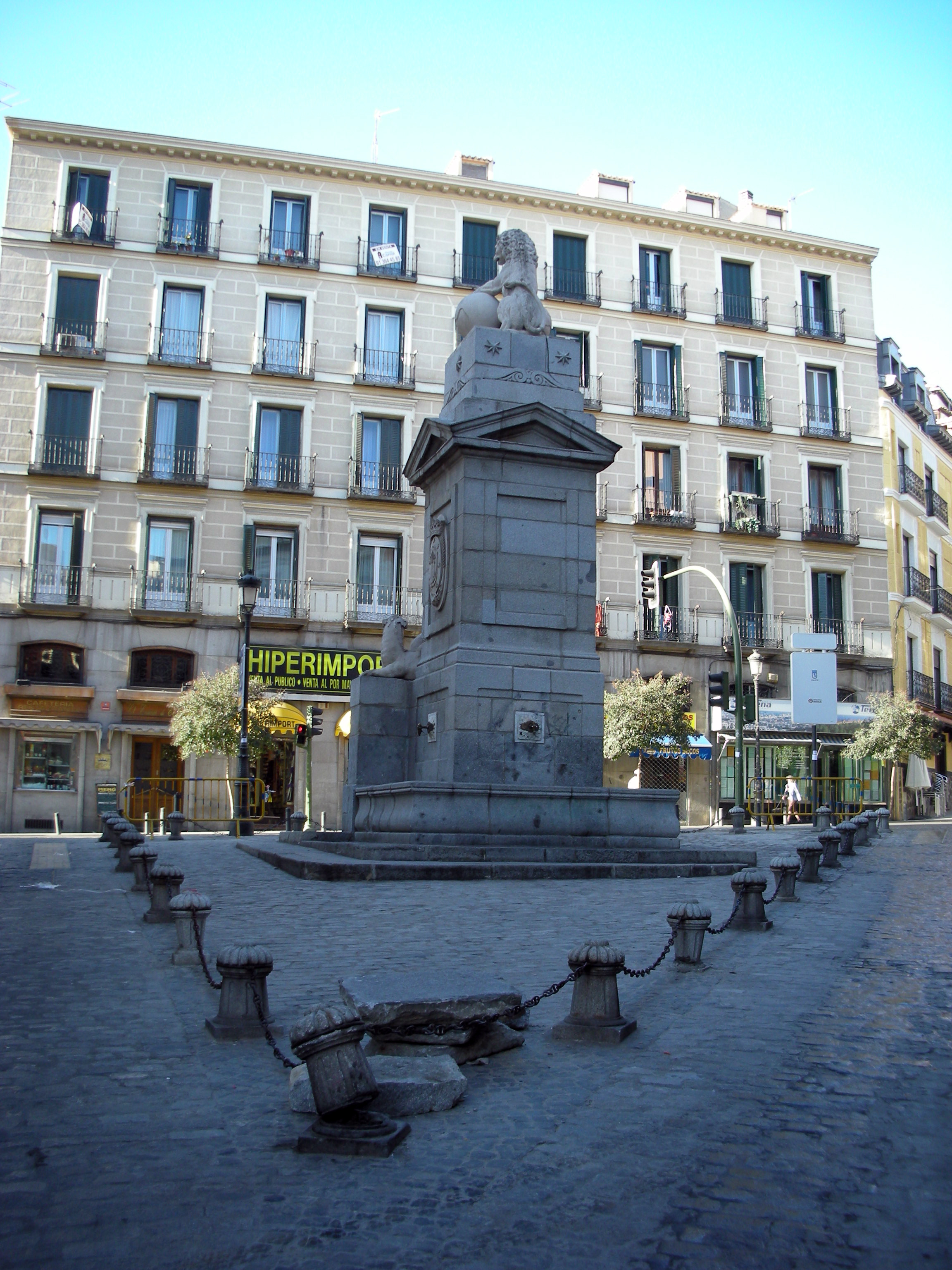 La Fuentecilla Fountain. Madrid, Spain